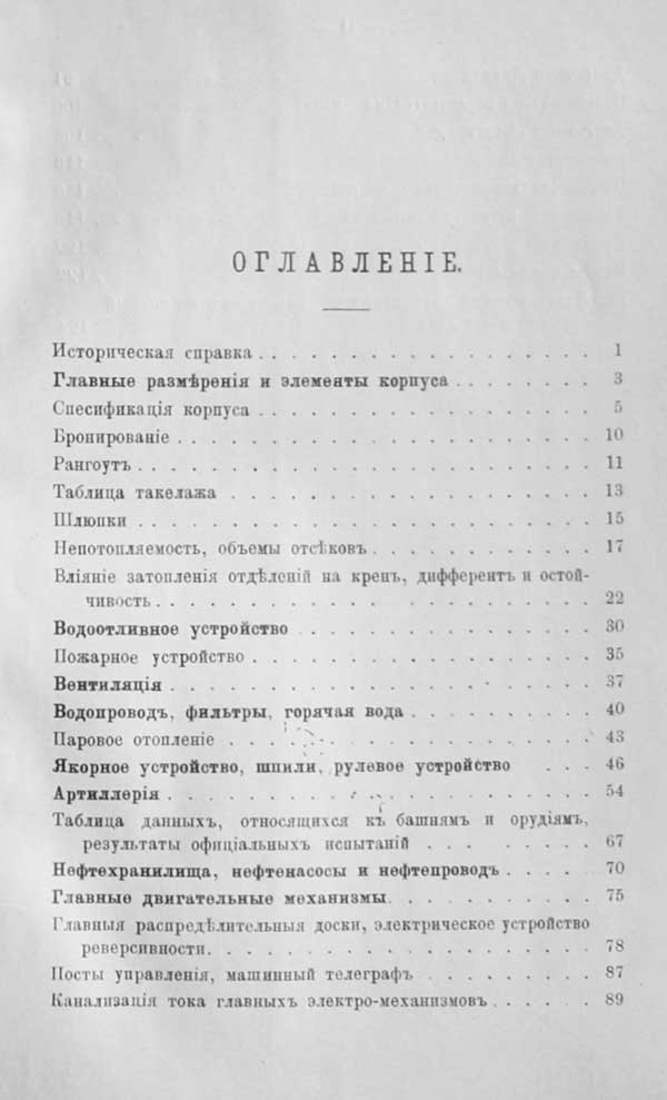 Лист книги Башенная канонерская лодка типа "Шквал"